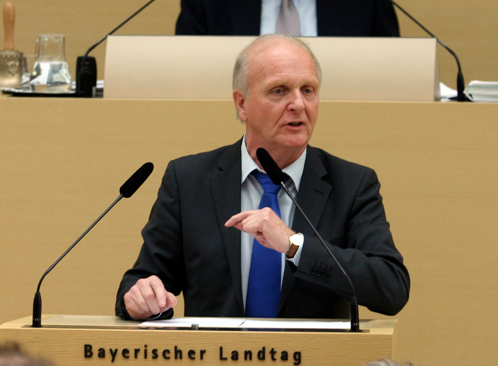 Otto Bertermann, deutscher Politiker (FDP), seit 2008 Abgeordneter im Bayerischen Landtag. Hier am 29. Februar 2012 bei einer Rede im Plenarsaal.